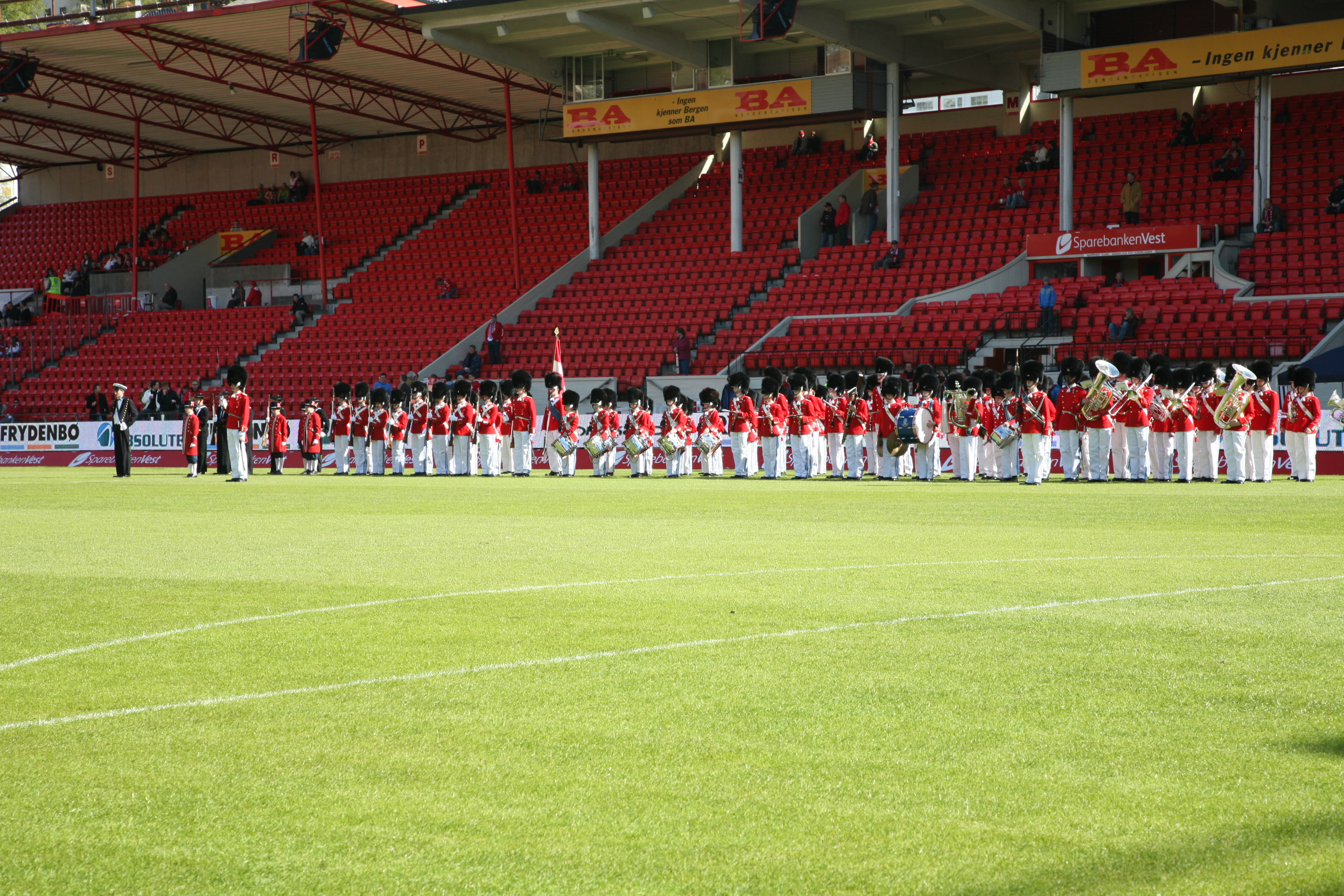 Tivoligarden i Bergen